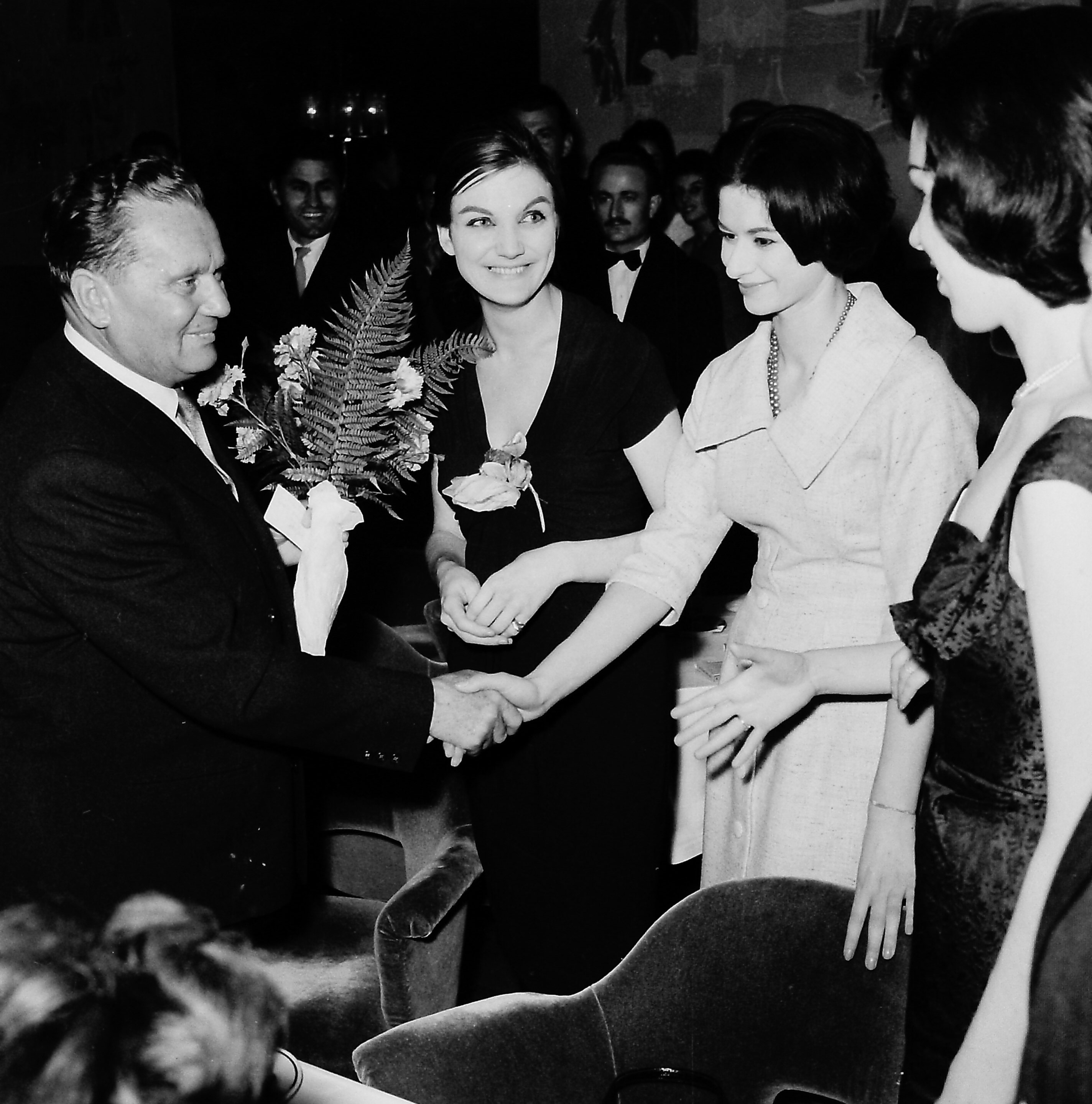 Margot Fontejn u Beogradu, 1954.Foto: Stevan Kragujević (po odobrenju kćerke Tanje Kragujević)